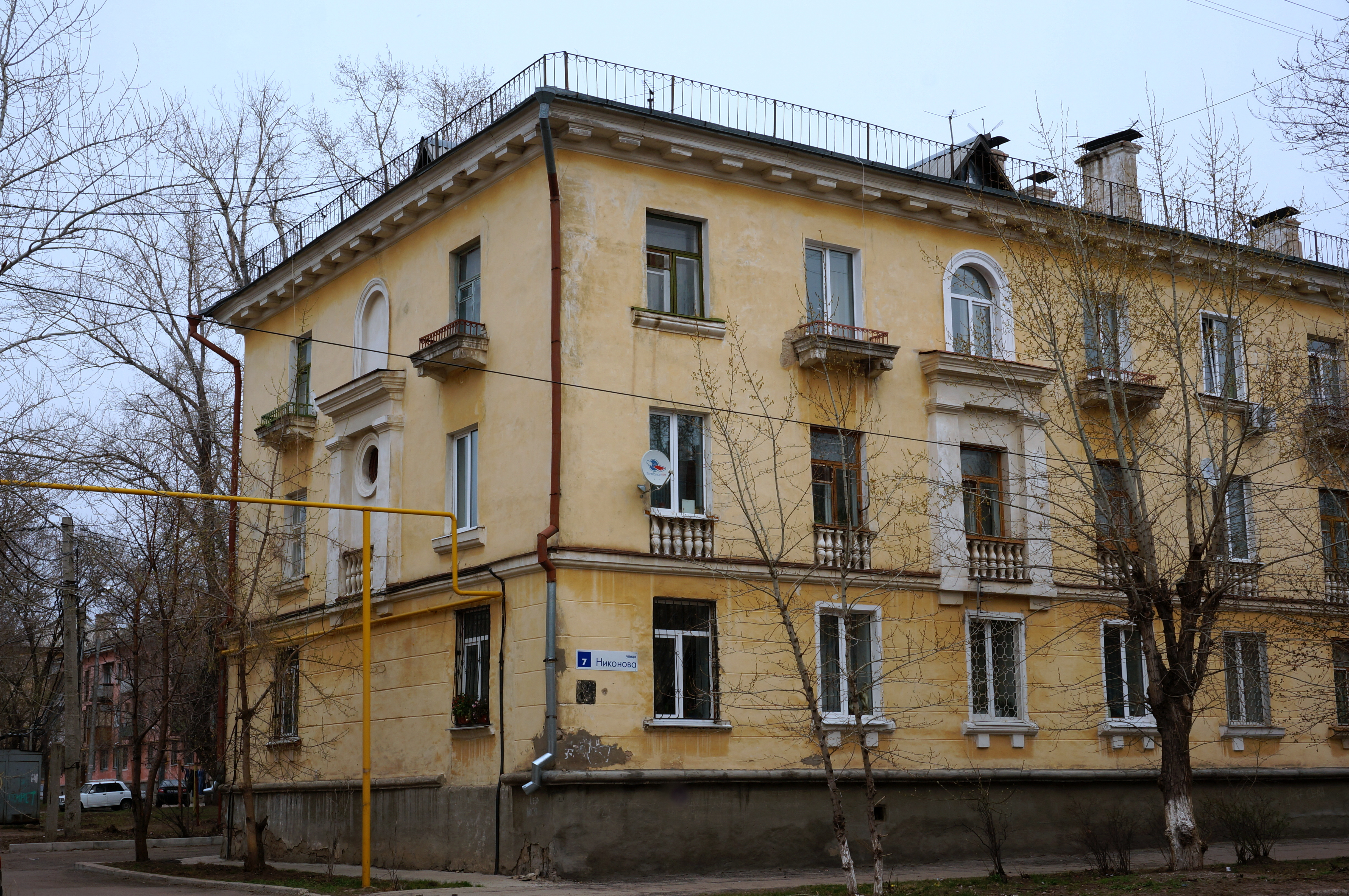 Дом по адресу ул. Никонова 7/ Крылова 3. Часть ансамбля застройки посёлка Шлюзовой (Тольятти, Россия). Жилой дом проекта архитектора В. Мухина построен в 1957 году. Строился тольяттинским судоремзаводом. Здание представляет собой единый архитектурный ансамбль, определяющий облик прилегающей площади. Типичный представитель эпохи советского классицизма.